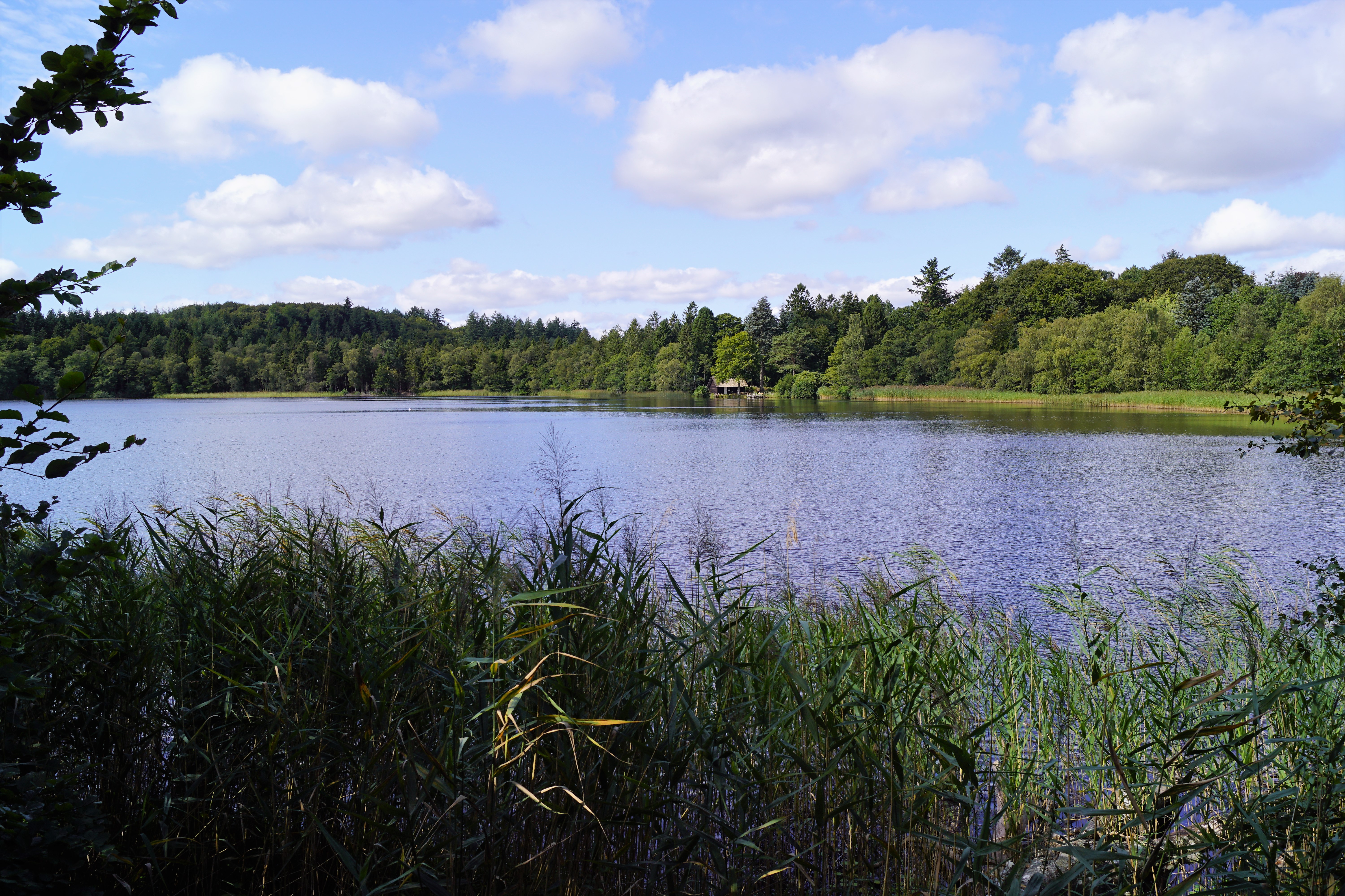 Vejlsø set mod nordvest